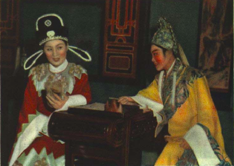 1952年 梁山伯与祝英台 越剧